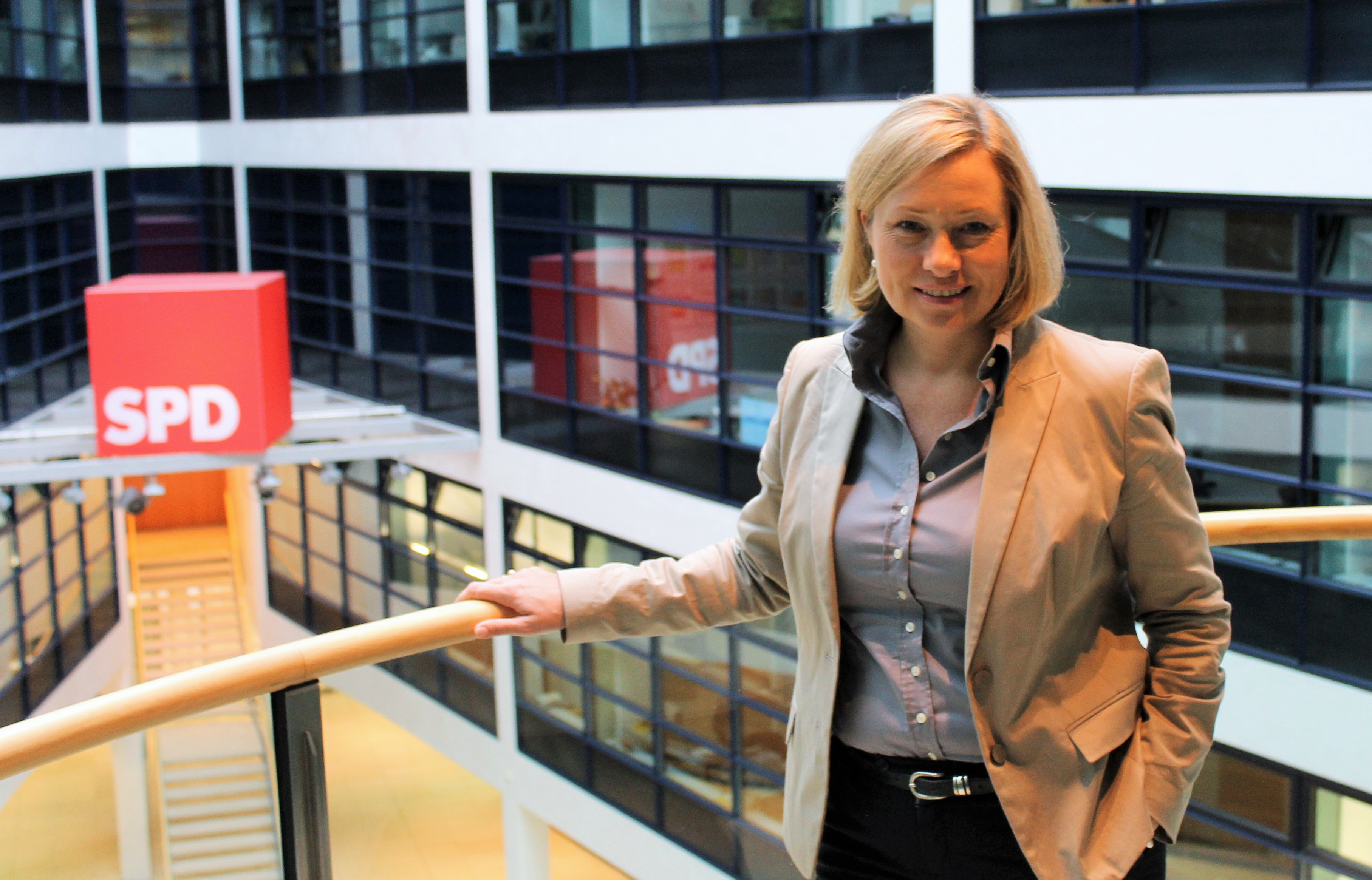 Doris Rauscher, SPD, Mitglied des Bayerischen Landtages